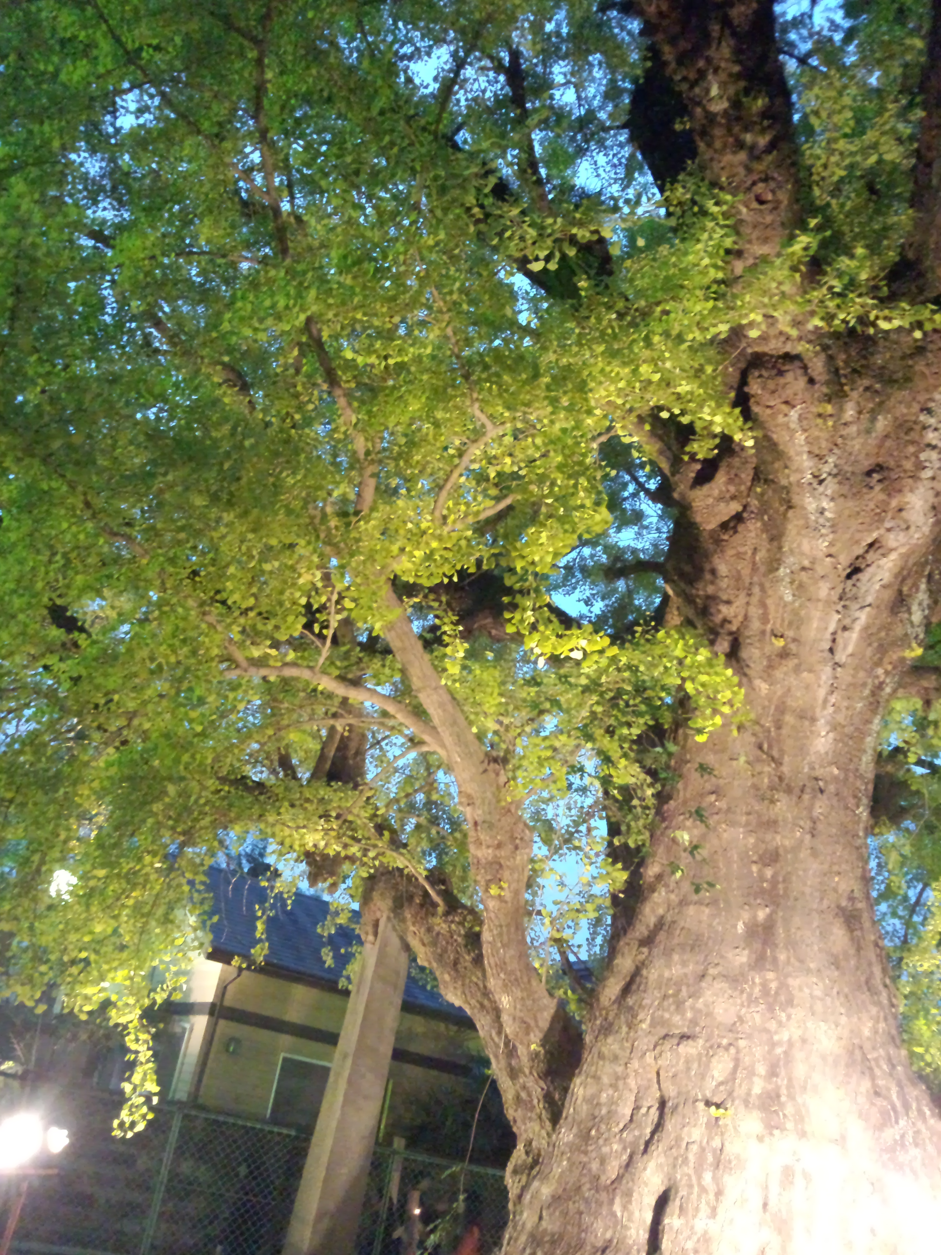 熊本市南区城南町にある、下田のイチョウ（2014年のライトアップ時）